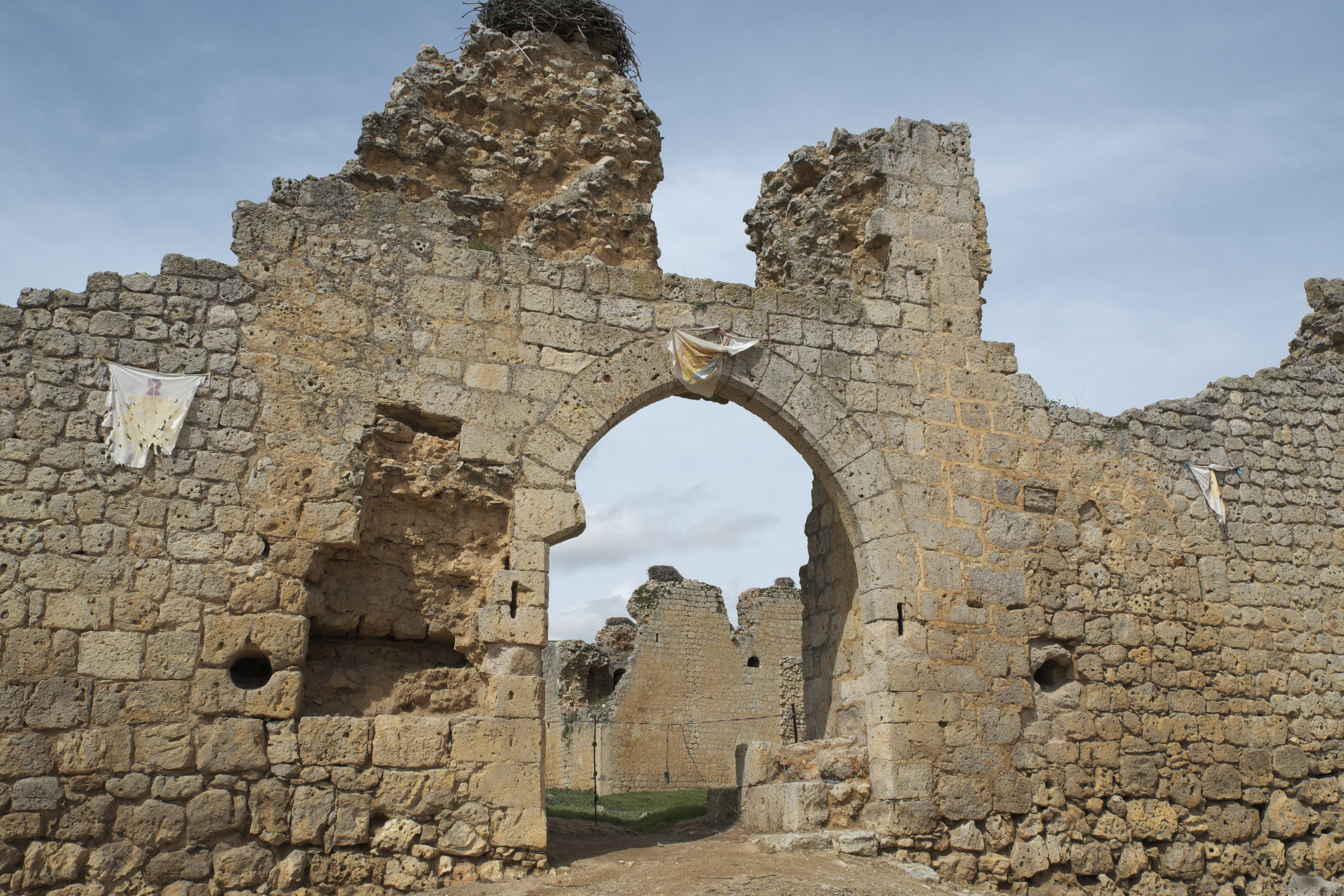 Castillo de Villagarcía de Campos, Palacio de los Quijada, in Villagarcía de Campos in der Provinz Valladolid (Kastilien-León/Spanien), Burgruine